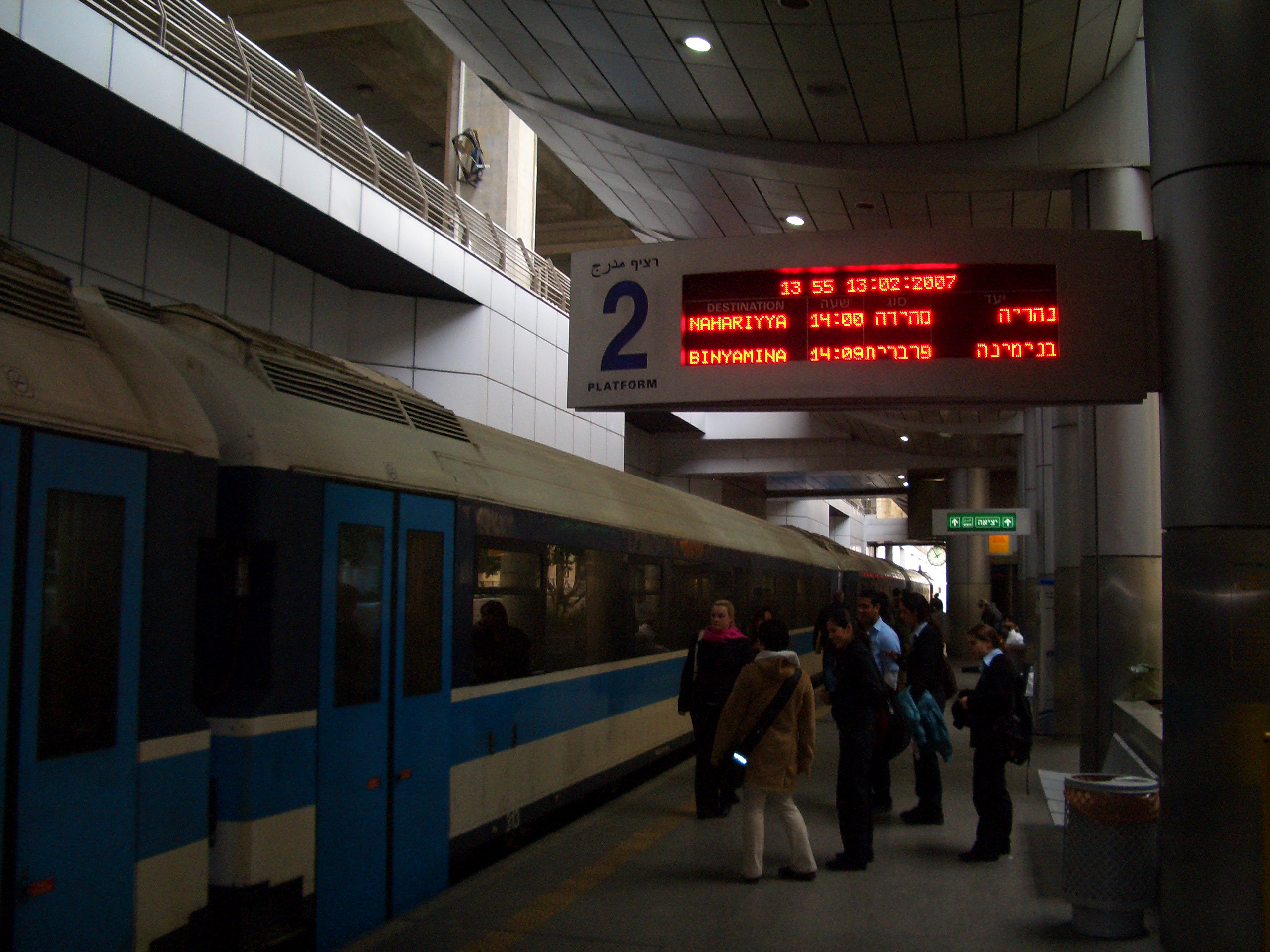 Einfahrender israelischer Zug, Bahnhof des Ben Gurion Flughafens.